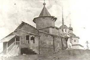 Деревянные храмы на Илезском погосте (слева направо: Николаевский Илезский храм, 1763 г.; Флоро-Лаврский Илезский, 1777 г.). Рисунок Вахрушова Ф. М., начало ХХ в.